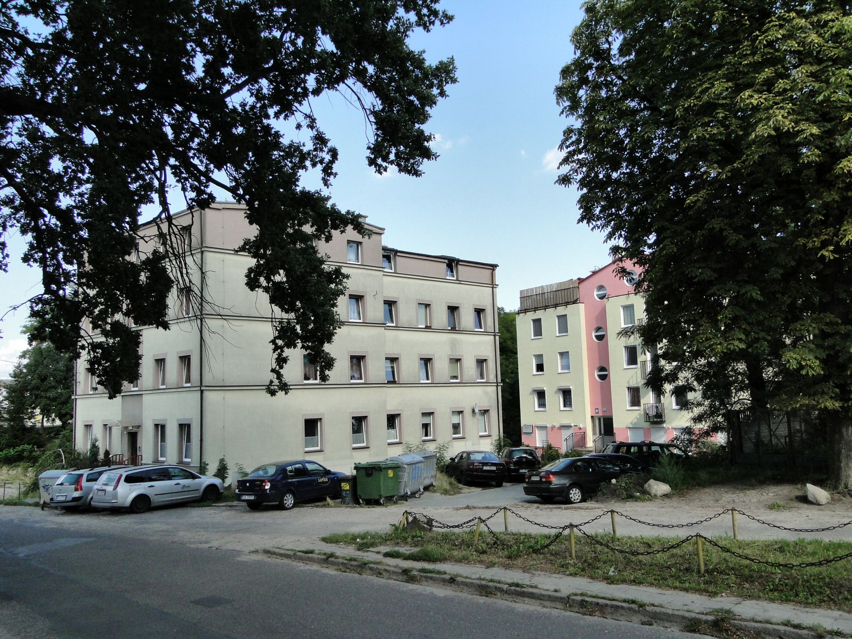 Ustowo